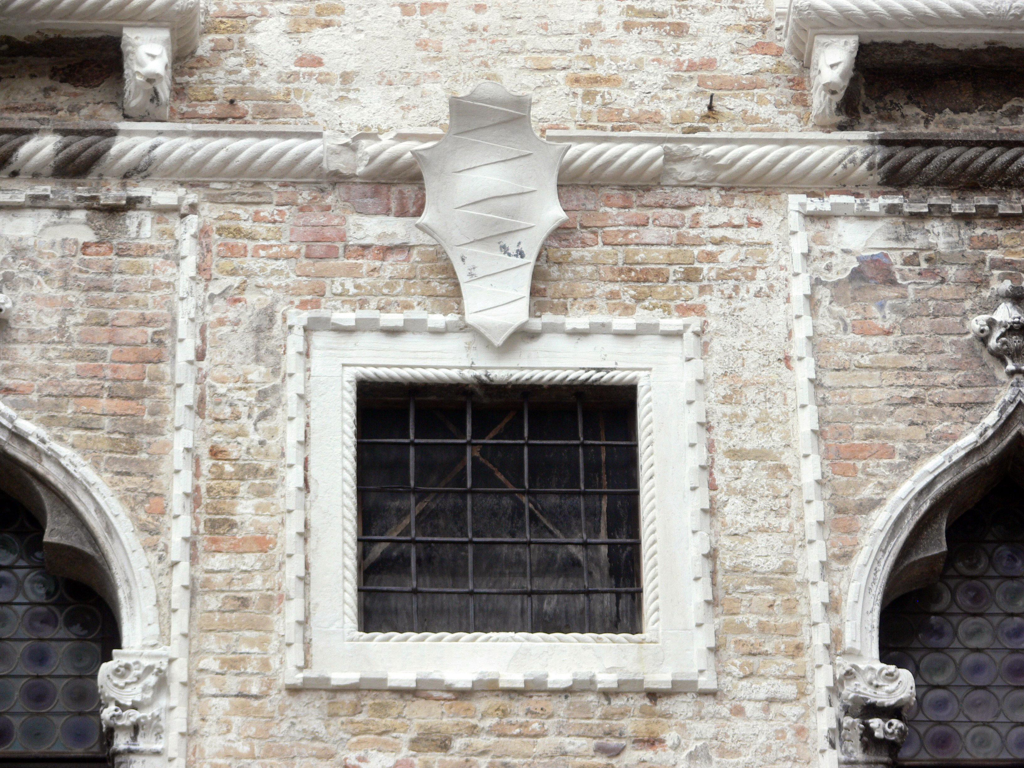 Palazzo Fortuny, à Venise